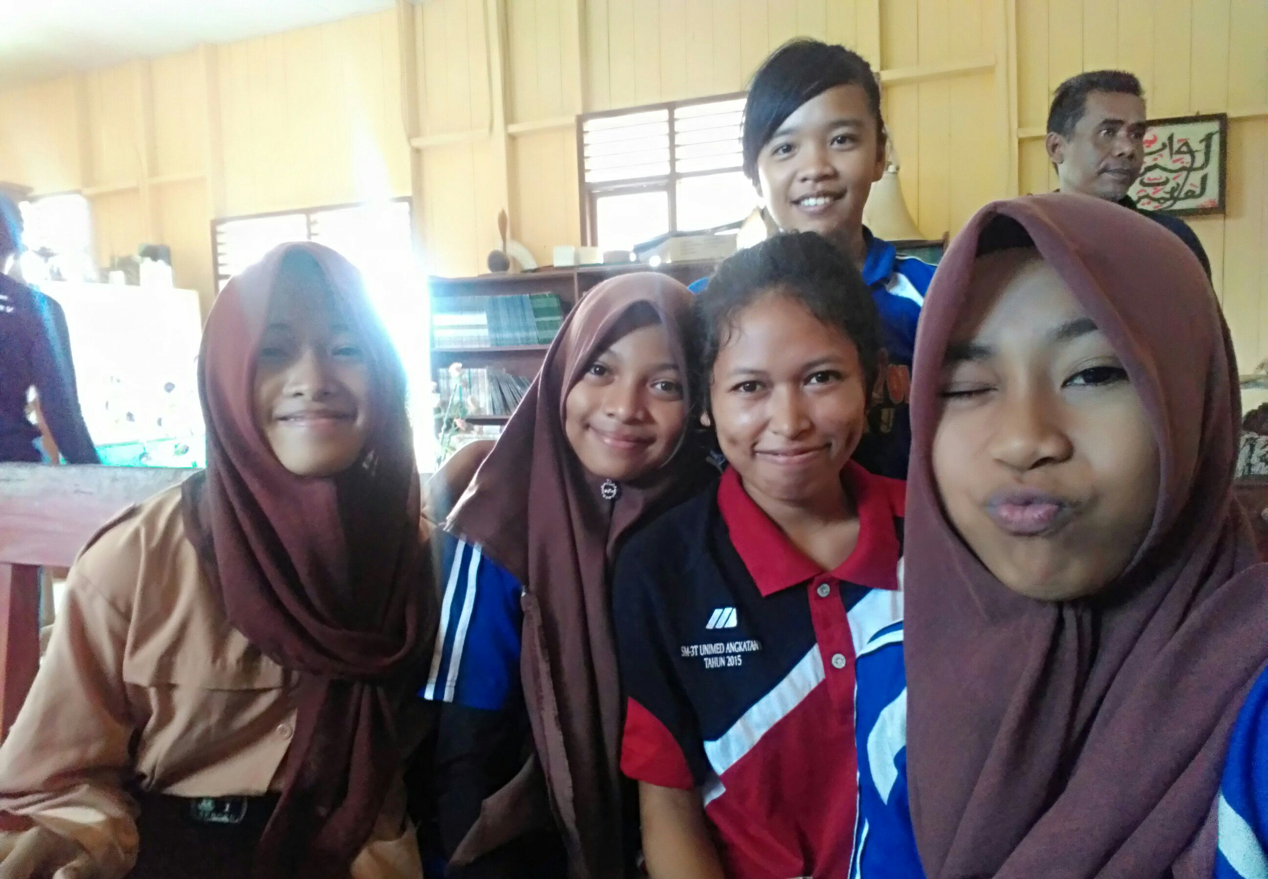 Tersenyum menghadapi hari-hari dengan mencintai pendidikan di SMPN 1 Sebuku; Kalimantan Utara; Indonesia This photo has been taken in the country: Indonesia